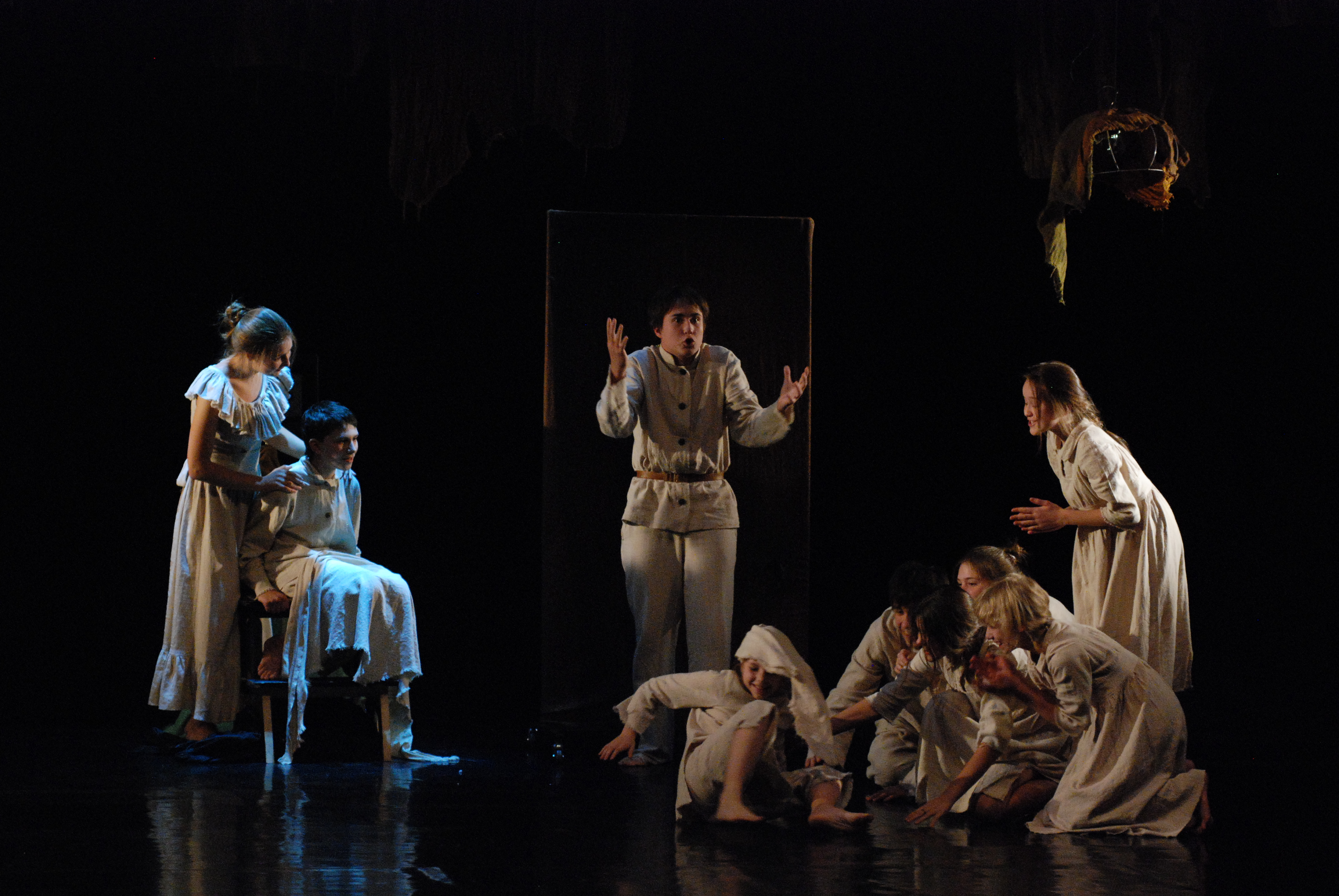 Театральная студия "Арлекин" Гран-при областного смотра-конкурса детских театральных коллективов "Сурская весна-2013" (г. Пенза) Гран при в номинации "Лучший спектакль" II Всероссийского фестиваля "Золотая провинция" (г. Кузнецк) Участник 16 международного фестиваля камерных спектаклей по произведениям Ф.М. Достоевского (г. Старая Русса)